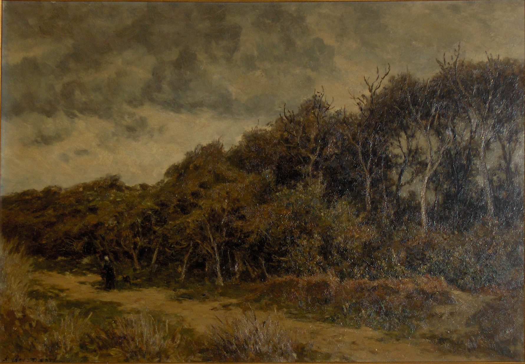 "Boszicht met wandelaarster", olieverf op paneel door Euphrosine Beernaert (1831-1901); privé bezit